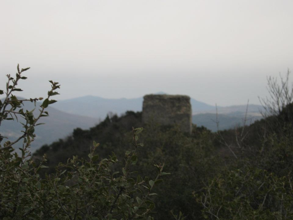 Isar Kale in Valandovo